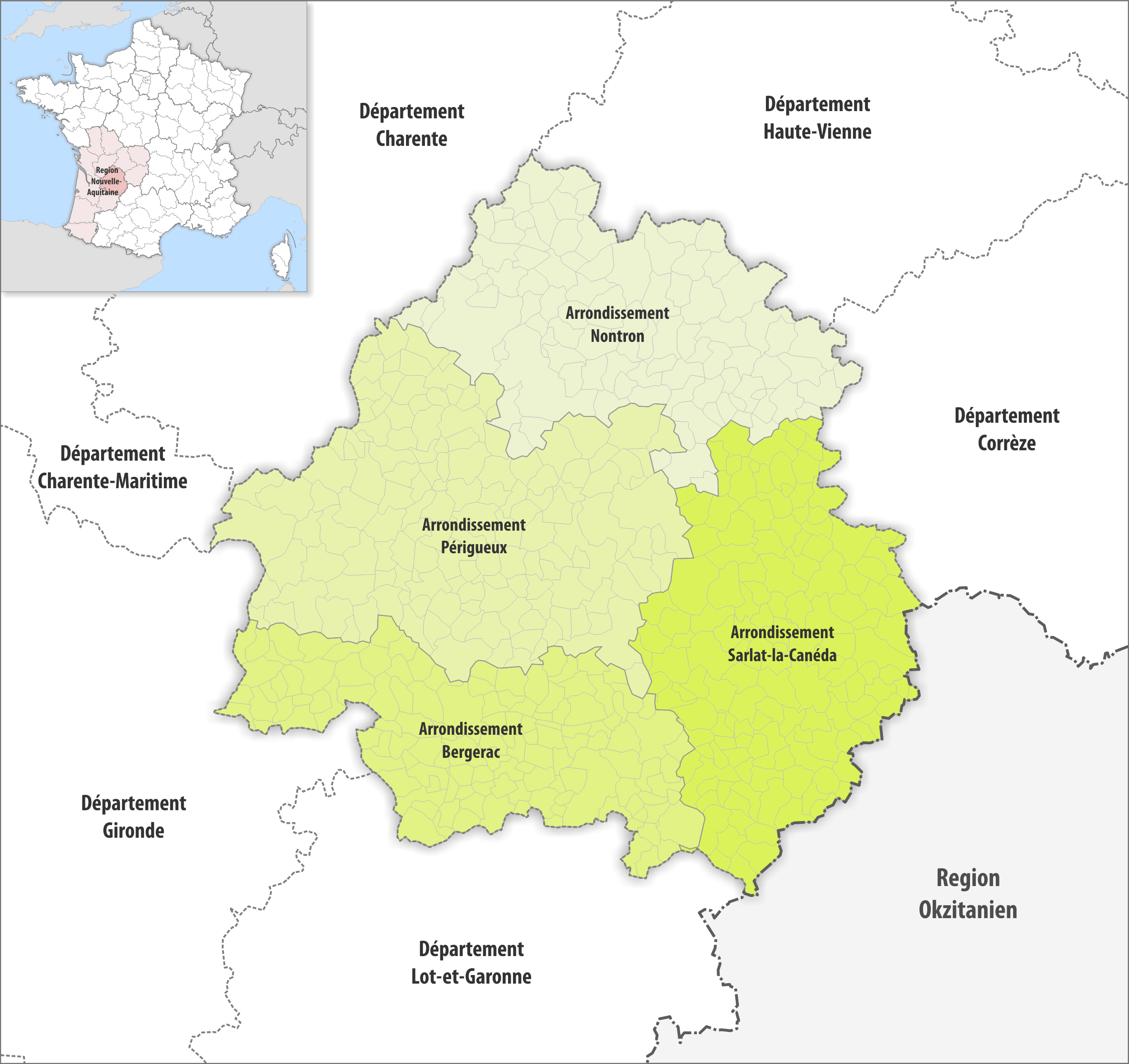 Gemeinden und Arrondissemente im Departement Dordogne